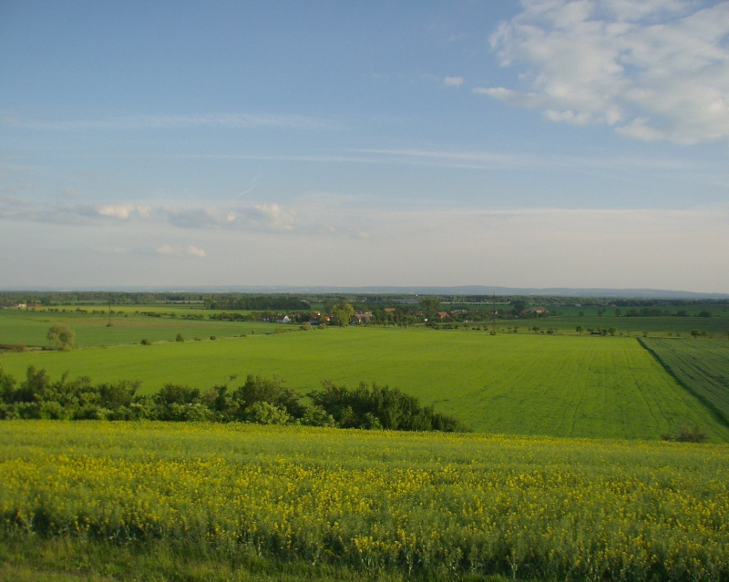 Foto obce Plch